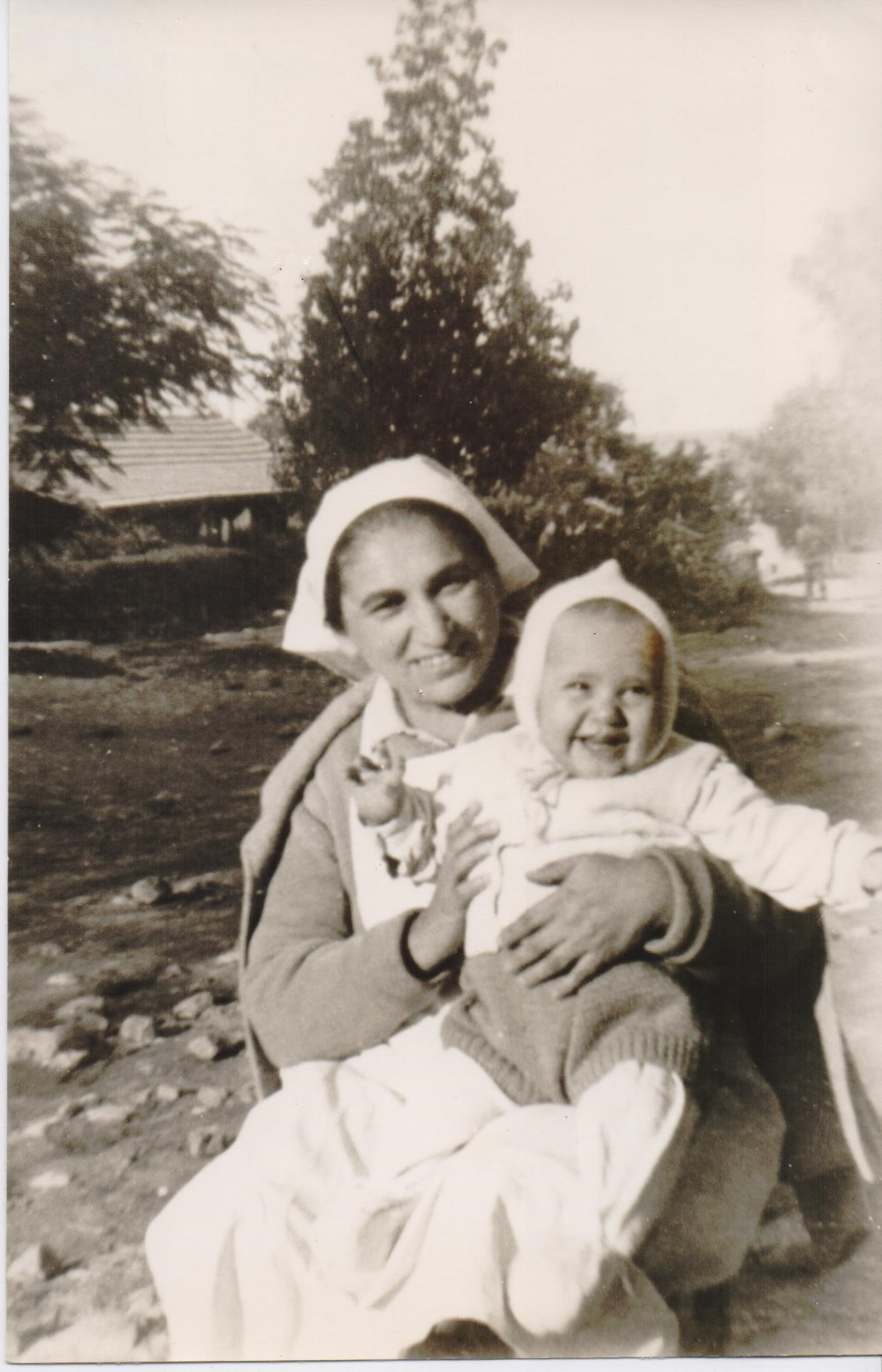 עדה יגורי ובנה אסף